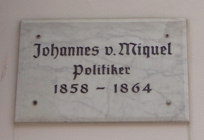 Göttinger Gedenktafel für Johannes von Miquel (Weender Straße 23-25)